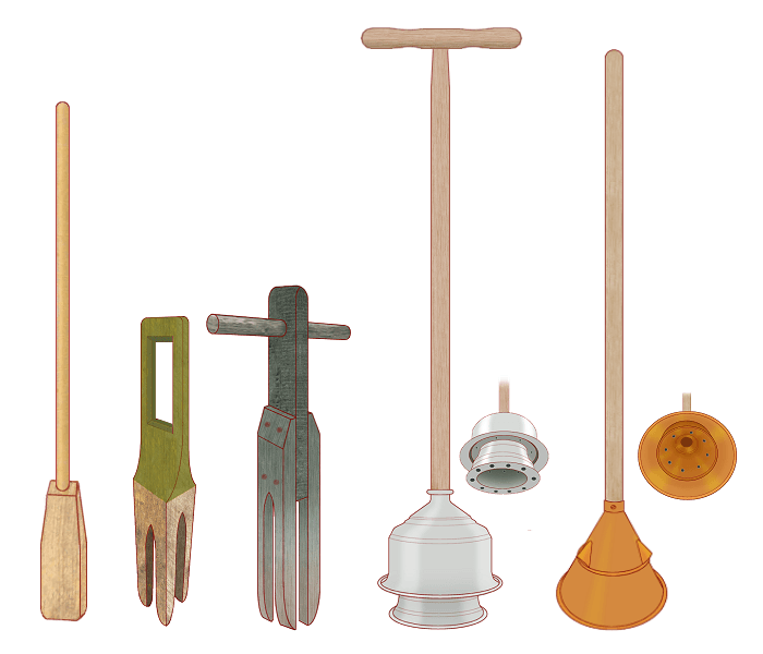 Wasstampers en wasklokken voor gebruik in wastobbes en wasketels